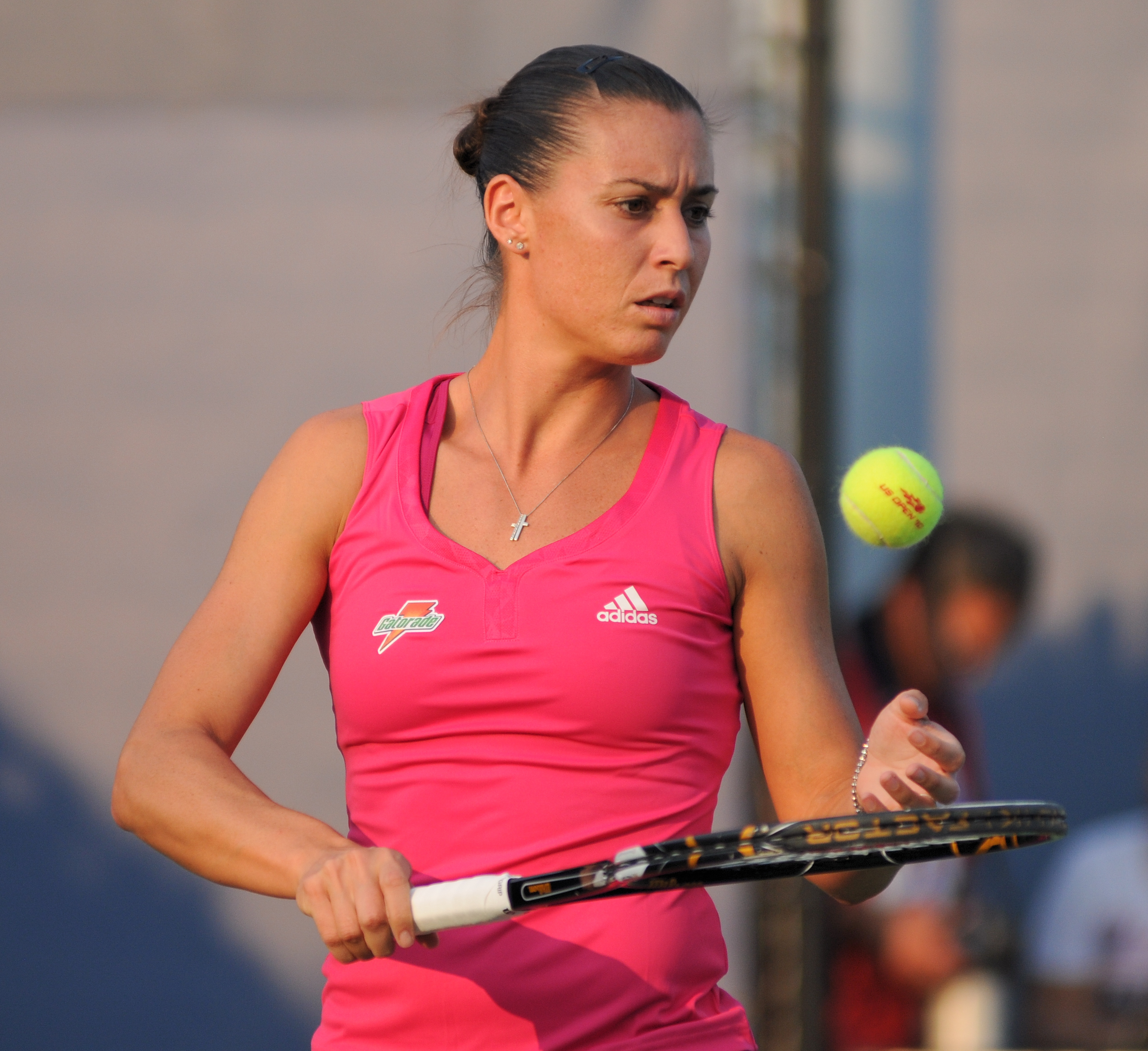 Flavia Penetta - US Open 2010